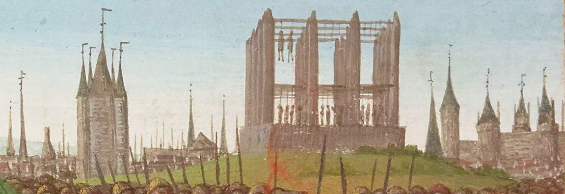 Détail des Grandes Chroniques de France enluminées par Jean Fouquet, fol. 236 recto.